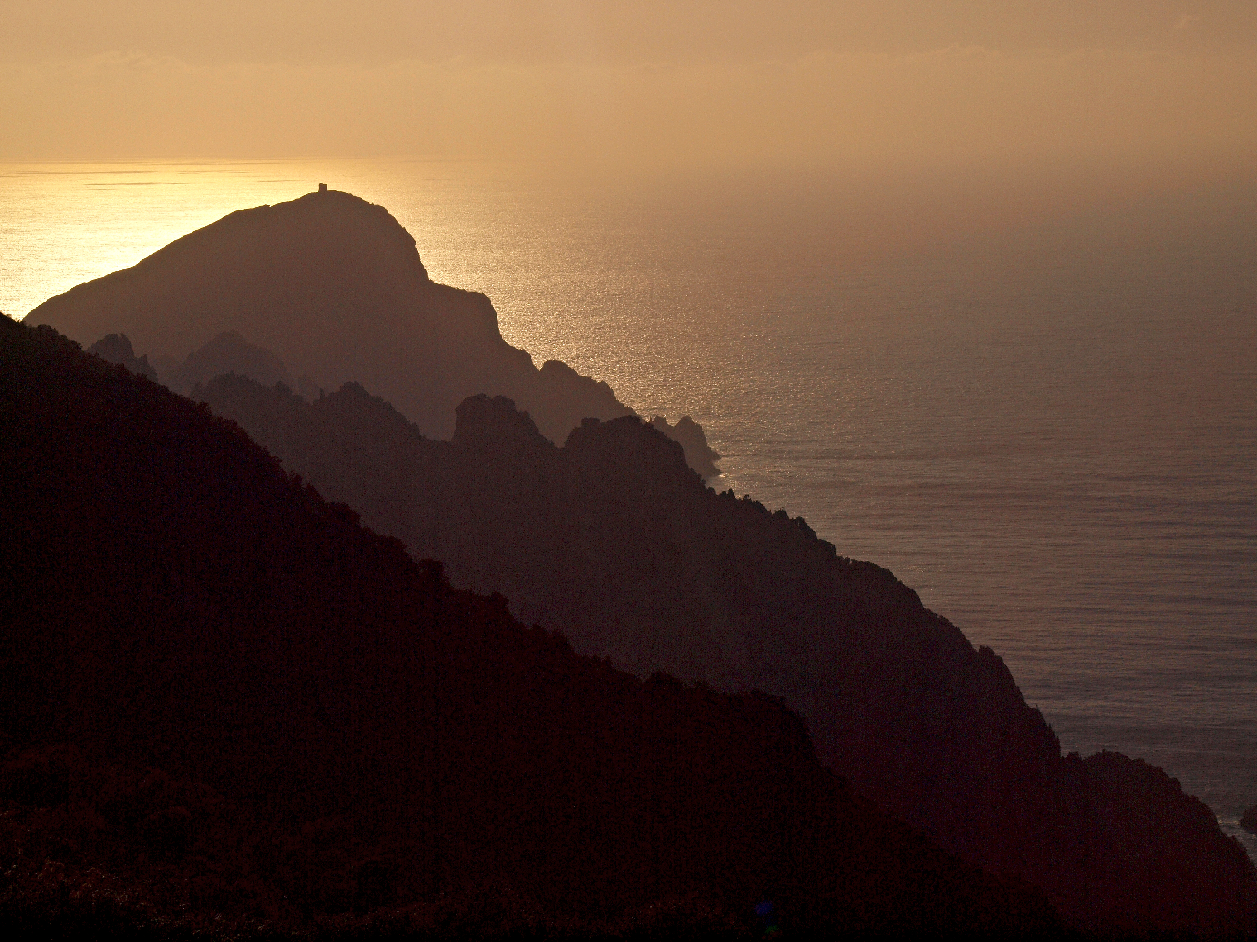 Piana (Corsica) - Capu Rossu au couchant